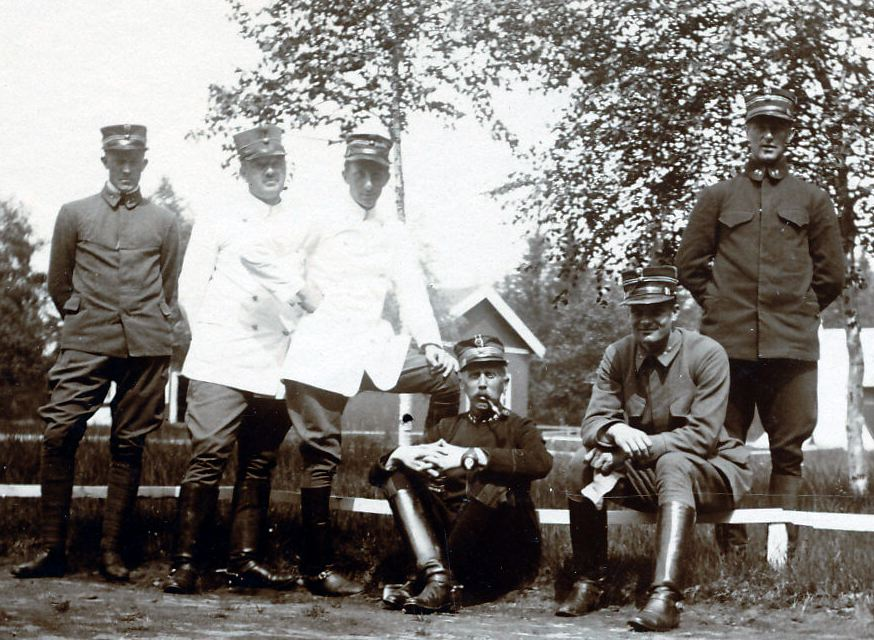 Gardermoen 1912, Vidkun Quisling lengst til venstre